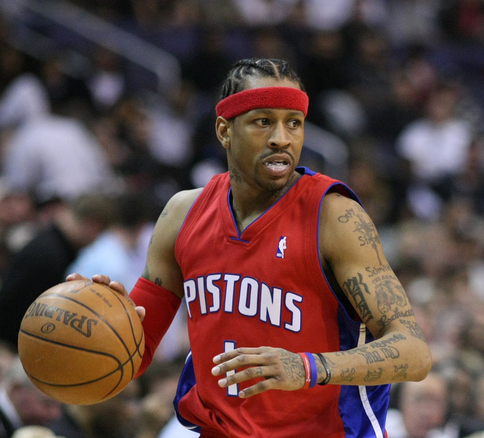 El jugador norteamericano de baloncesto Allen Iverson.